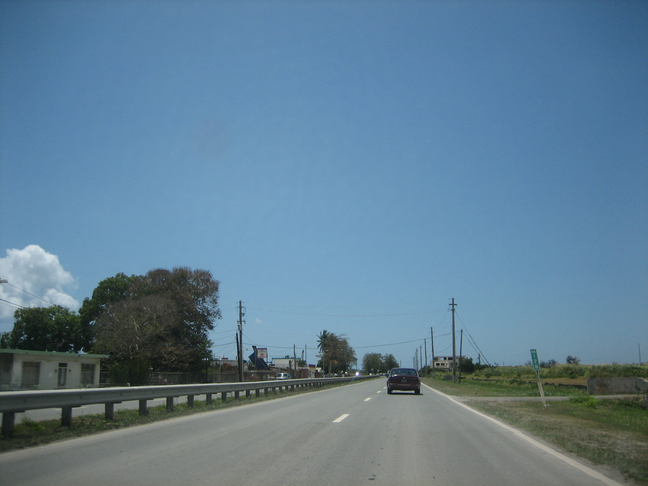 PR-3 Arroyo